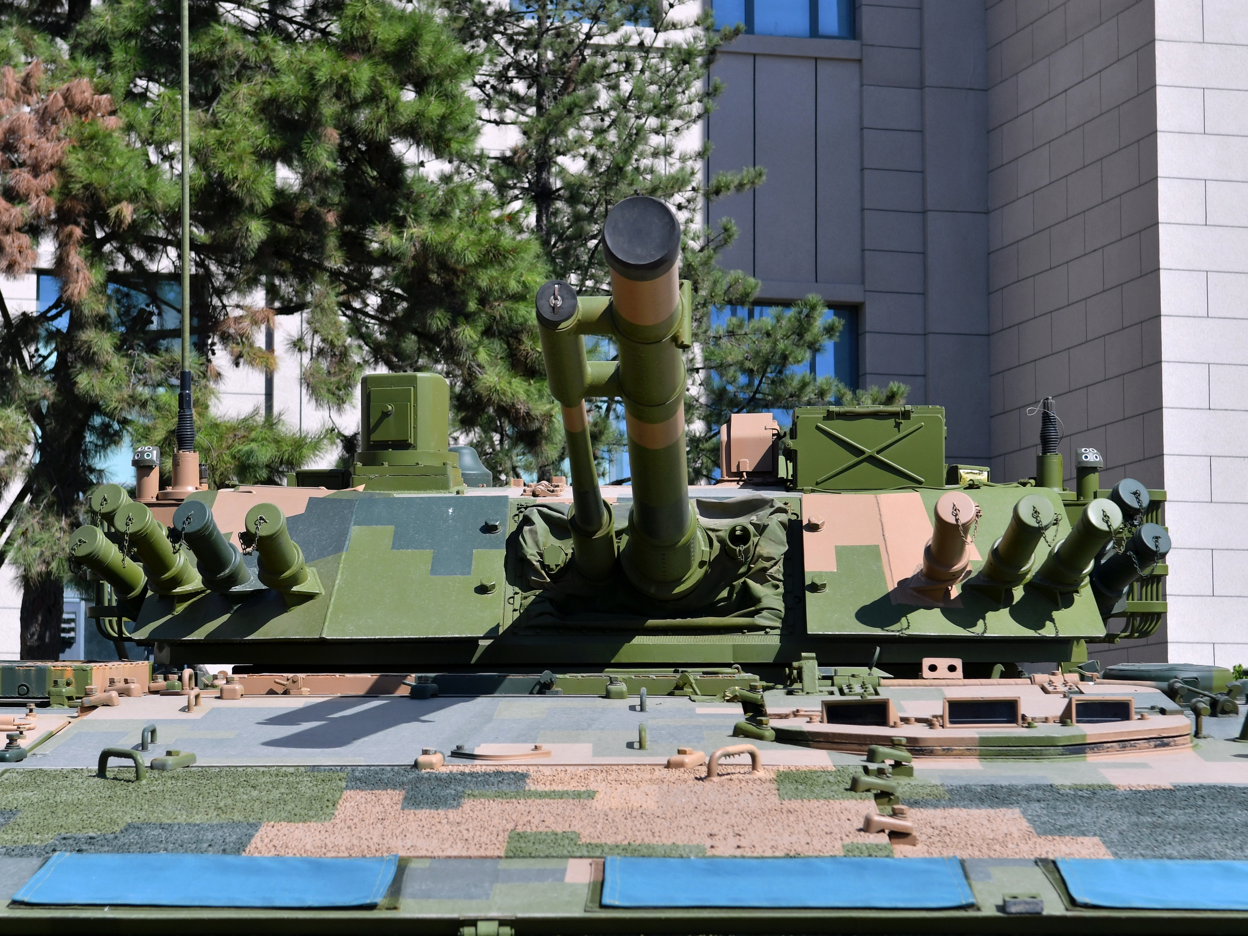 ZBD-04A步兵战车炮塔正面